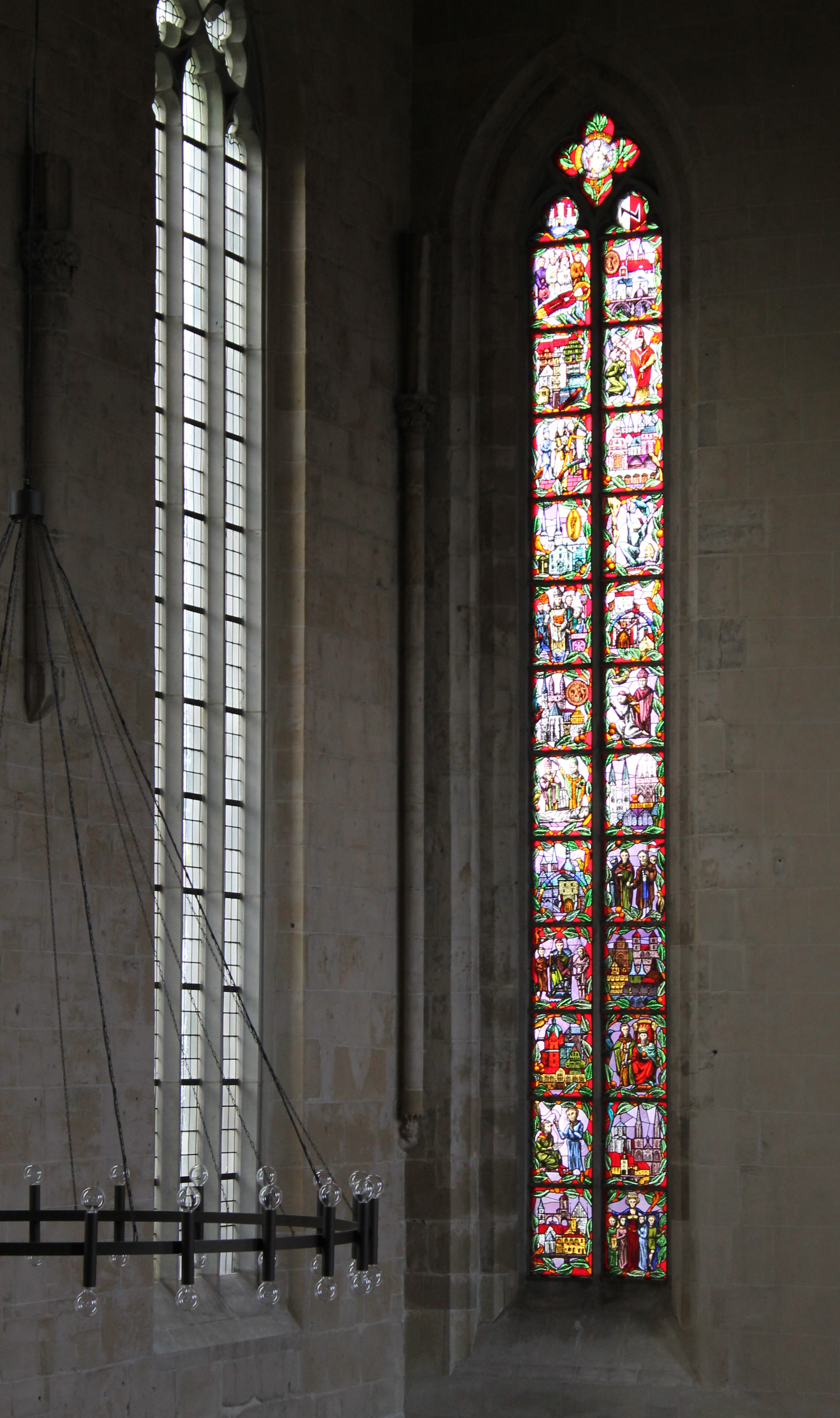 Hier handelt es sich um das Burchardsfenster, das Ostfenster im nördlichen Seitenschiff der St. Andreaskirche Halberstadt, welches Hans-Georg Losert 1985 bearbeitet hat.